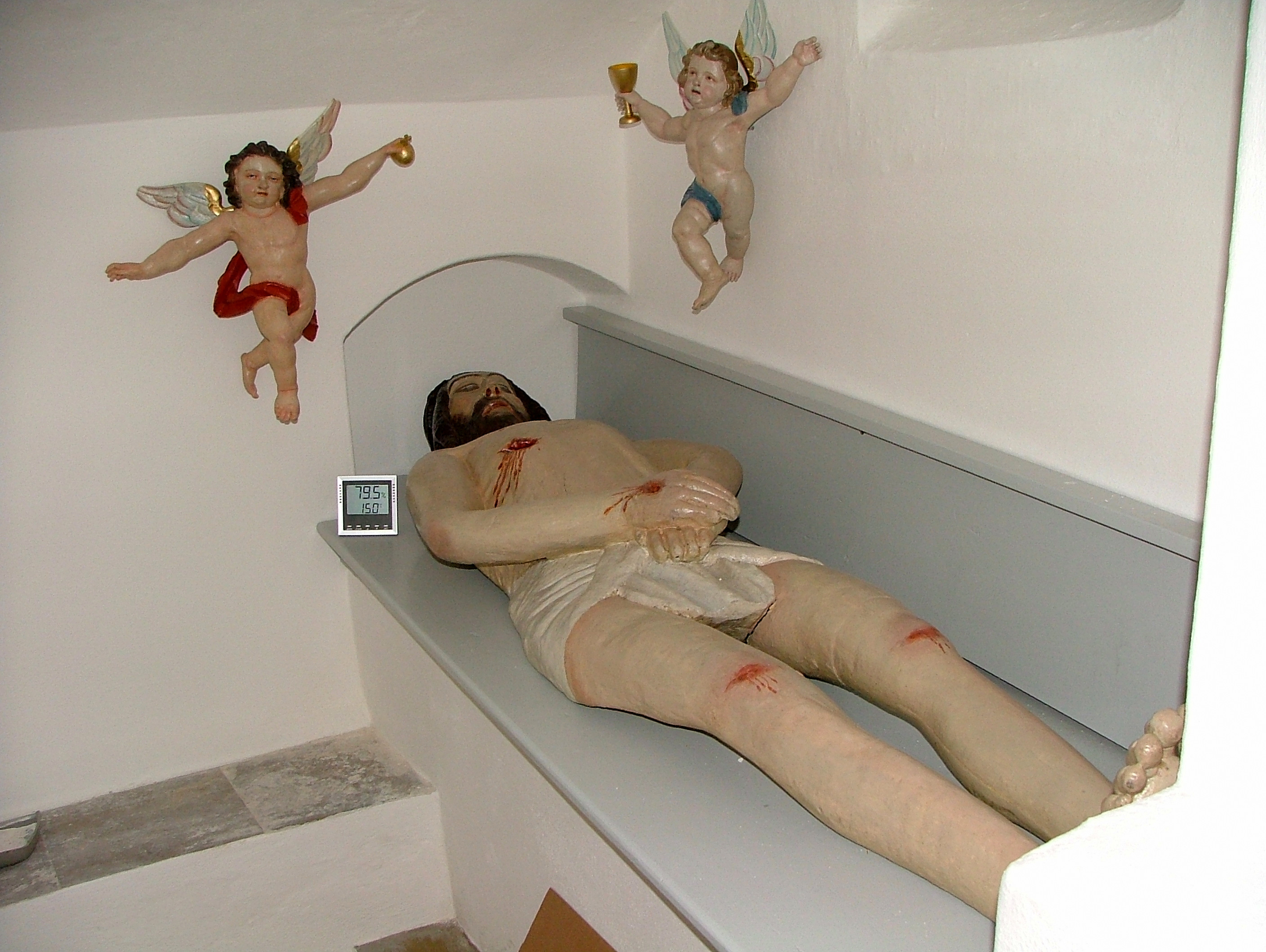 Hl. Grab von 1300